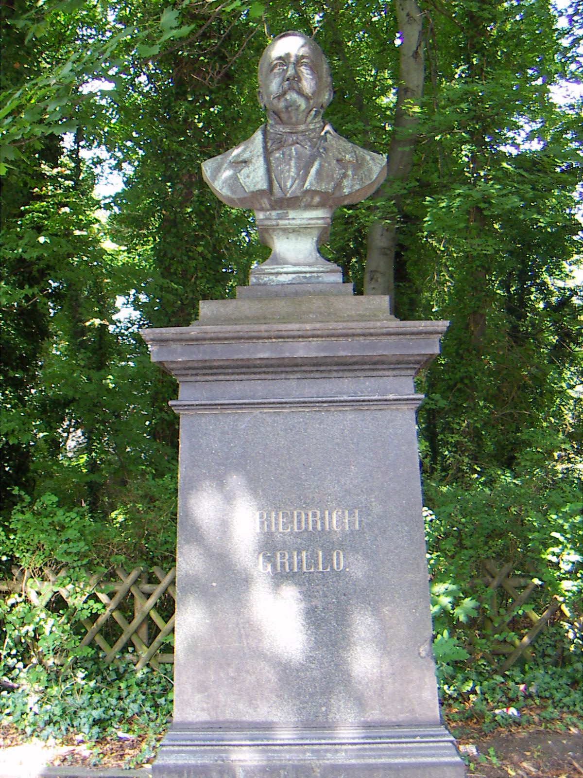 Friedrich Grillo (1825-1888), Großindustrieller im Ruhrgebiet (Büste aufgestellt am Kurpark in Unna-Königsborn)